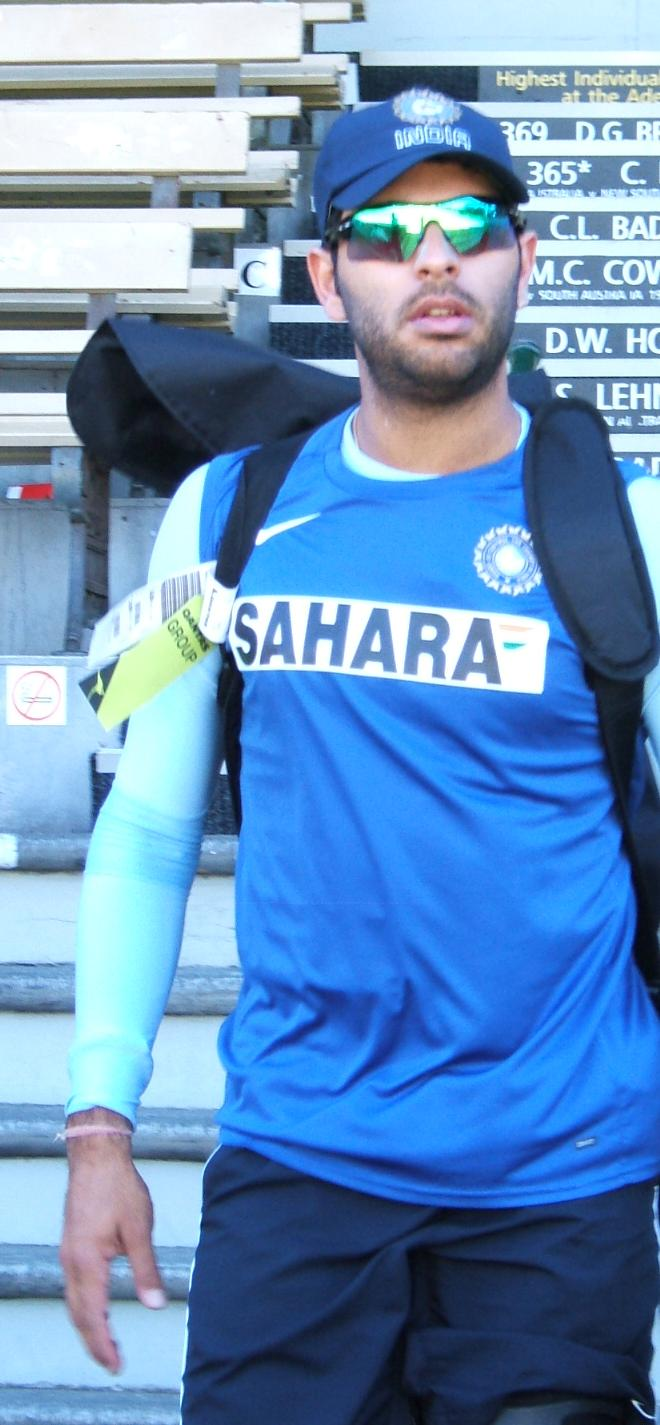 Yuvraj Singh at Adelaide Oval